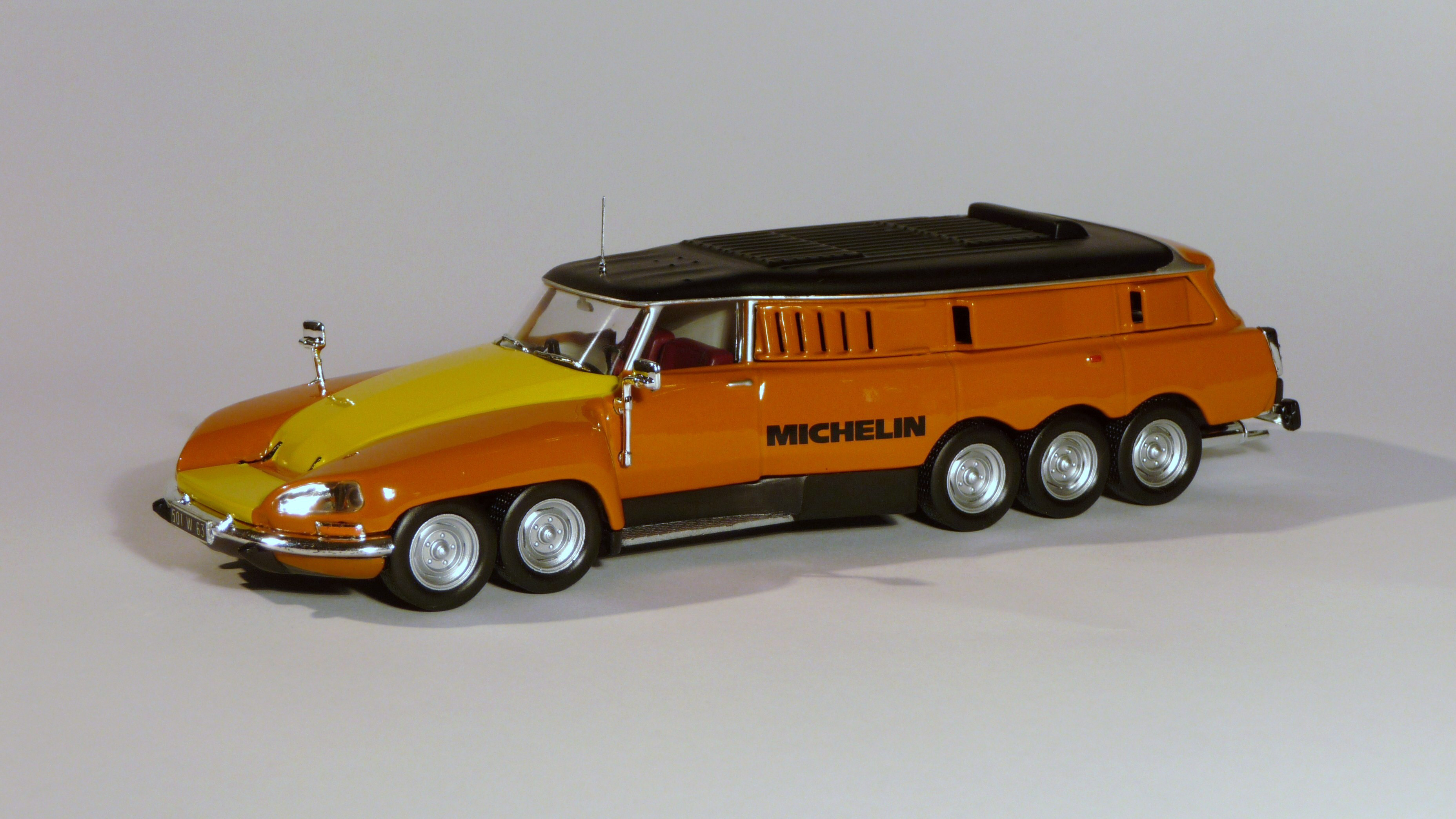 Citroën DS "Mille Pattes" Michelin (Réduction au 1/43e)